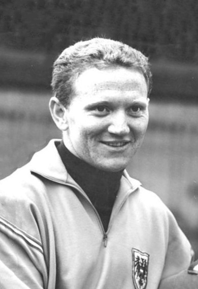 Zentalbild Kohls-Schaar 24.8.62 X. Schwimm-Europameisterschaft 1962 in Leipzig Zwei Europameister stellen sich den Fotografen. Kurt Mrkwicka, Europameister im Kunstspringen der Herren (Österreich).